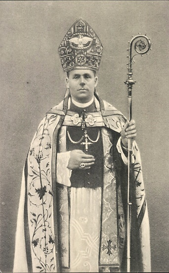 Bischof Johann Baptist Sproll, Rottenburg-Stuttgart, 1915